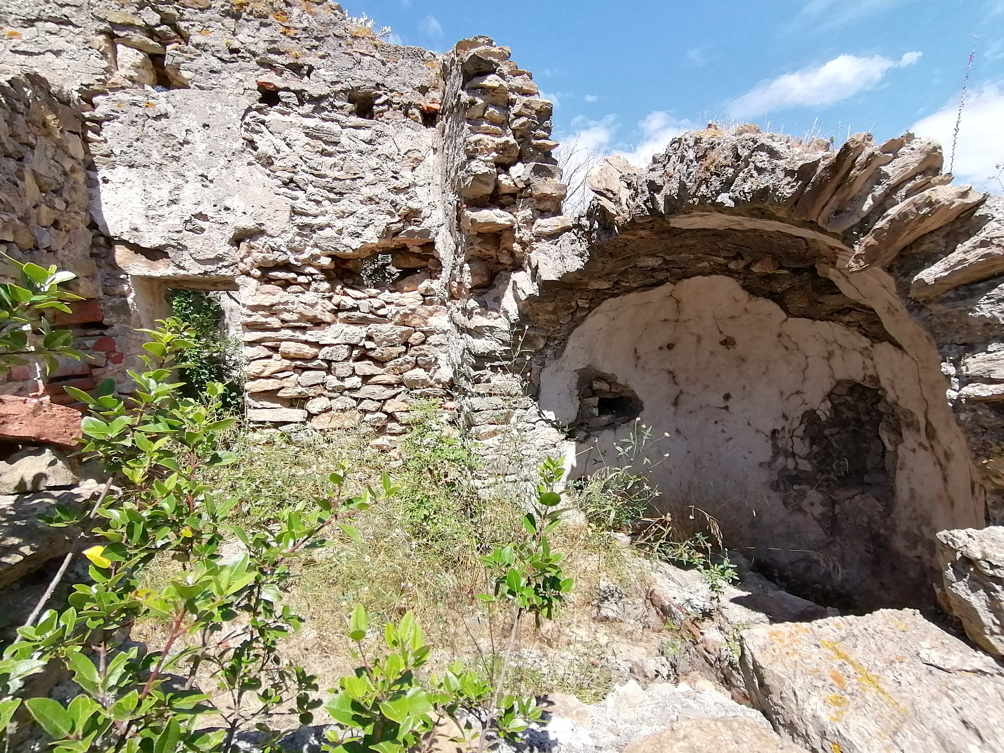 L'interno della Chiesa di San Lazzaro a Noli.